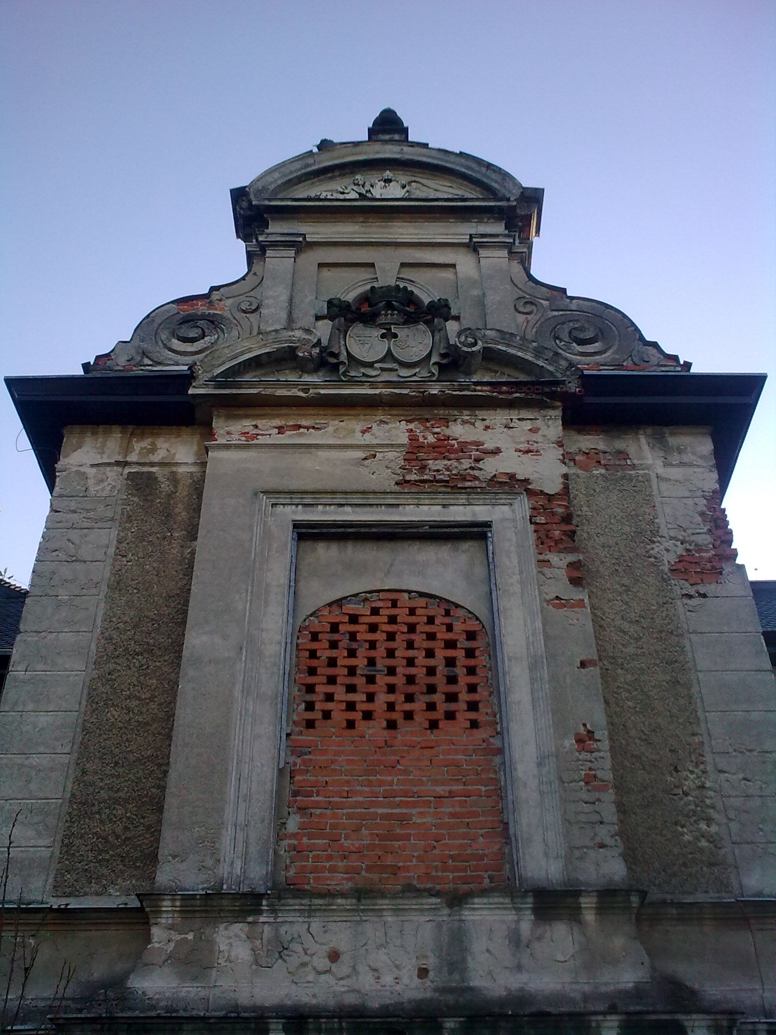 Pałac w Wiśniowej